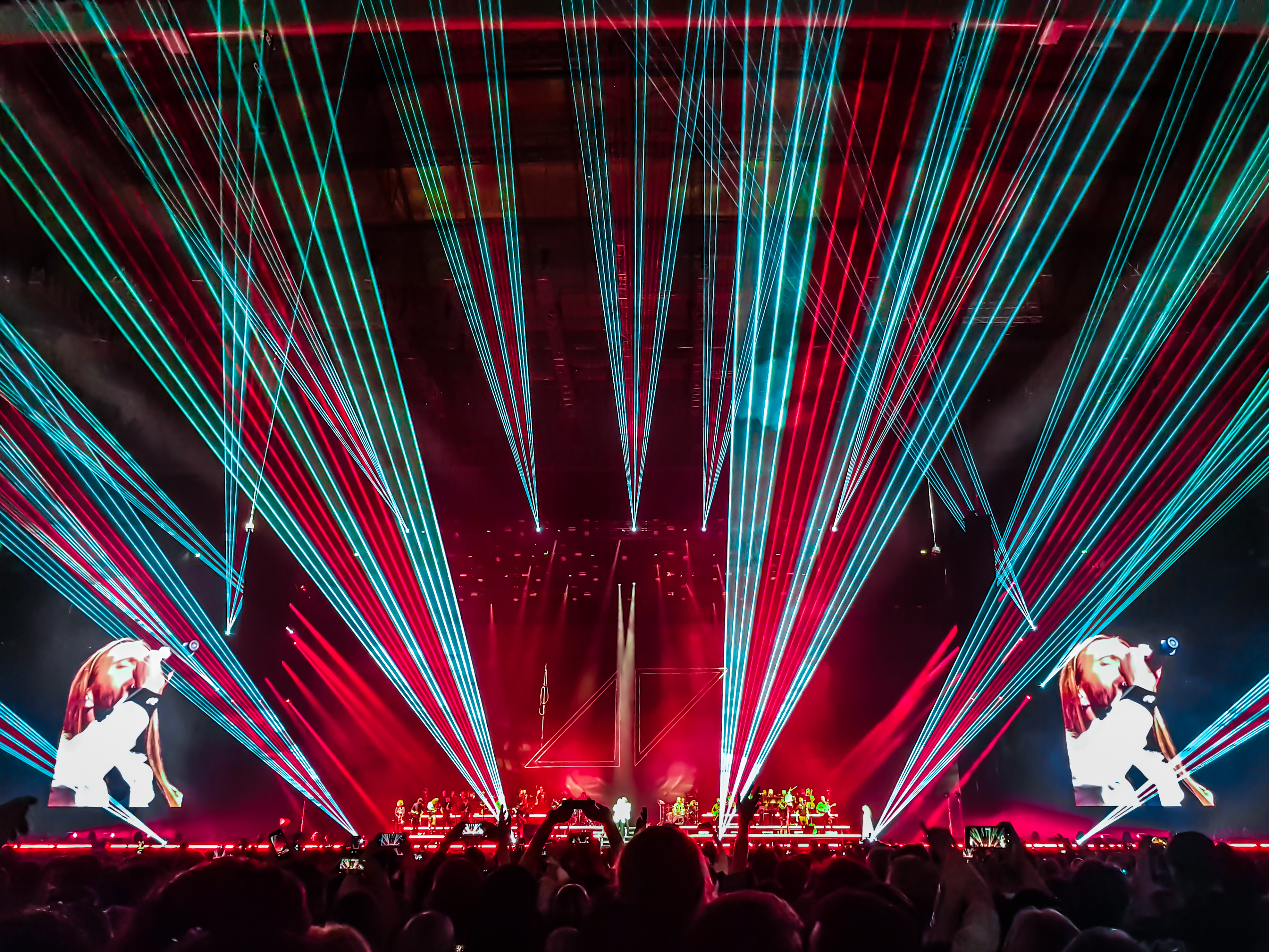 Avicii Tribute Concert